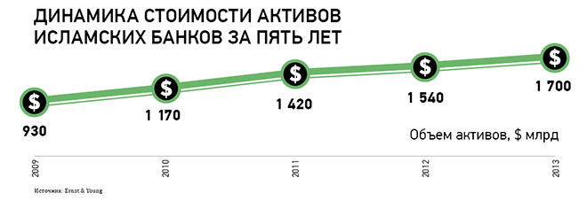 Динамика стоимости активов исламских банков (2009-2013)